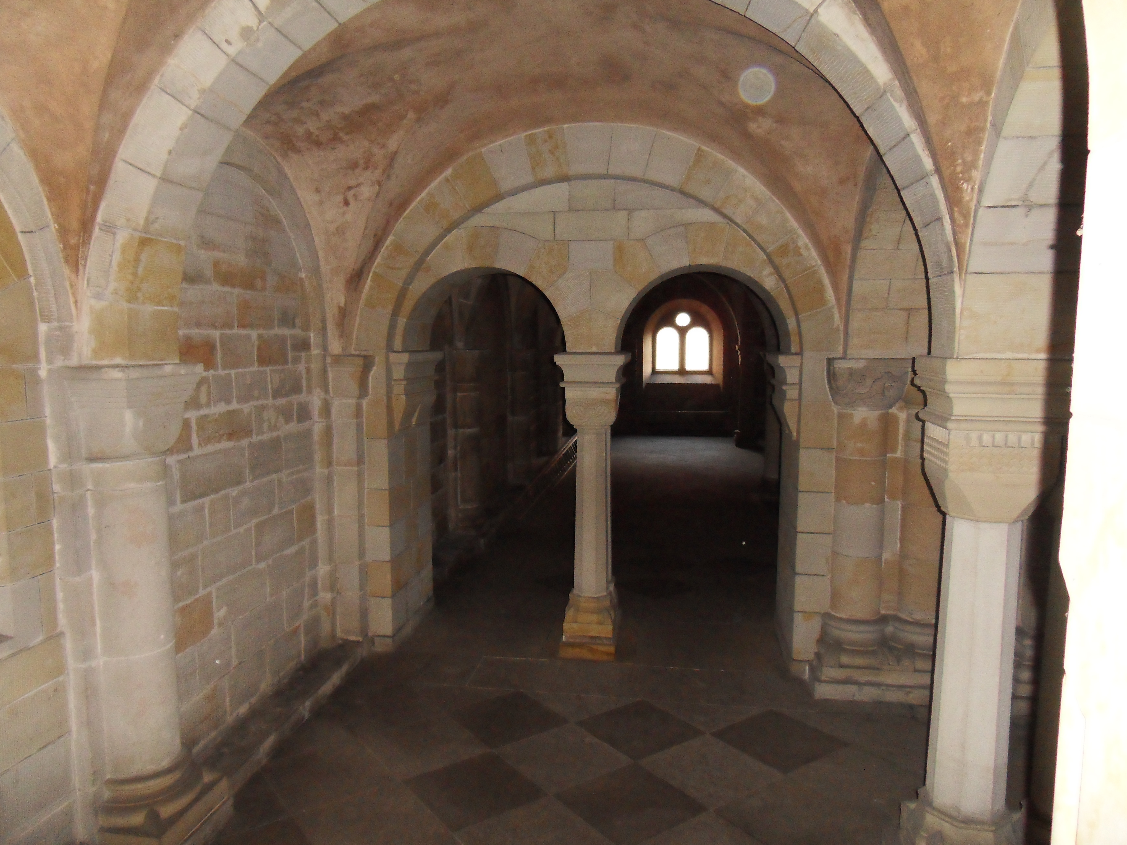 Krypta kláštera Doksany postavená v románském slohu